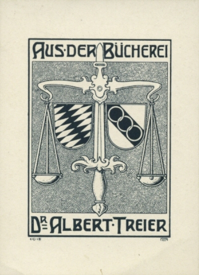 Ex Libris für Albert Treier